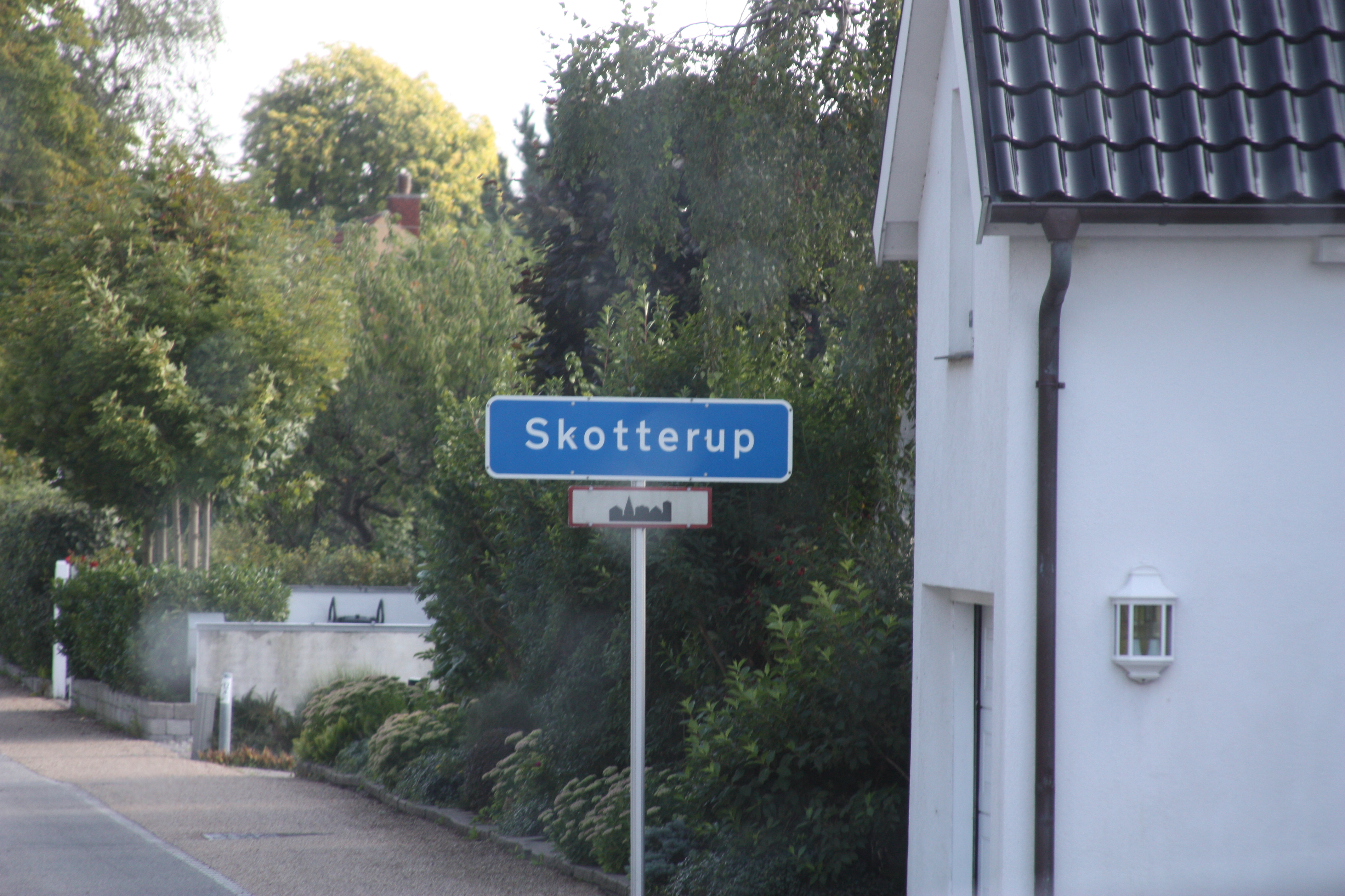 August 2009